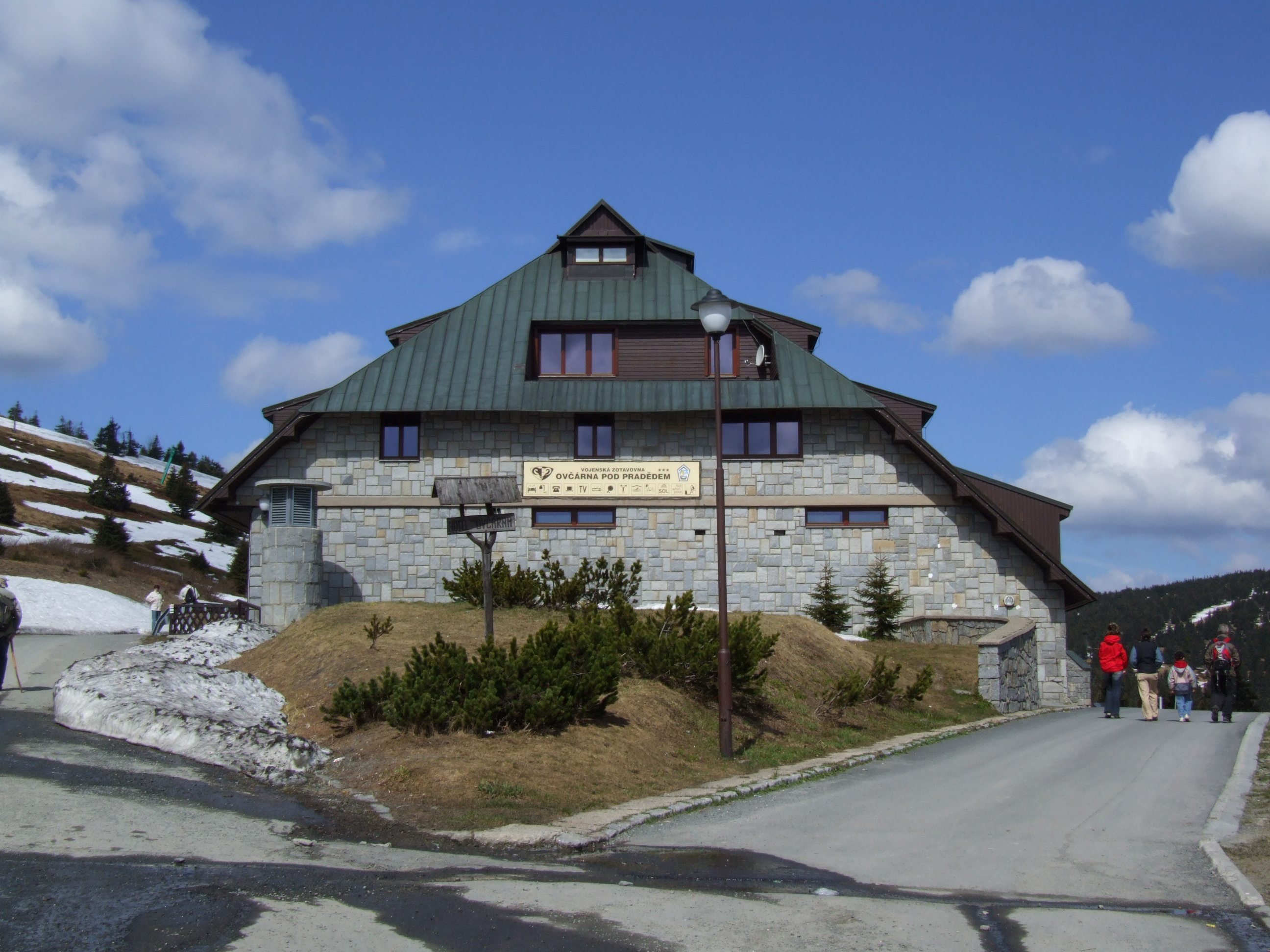 Hotel Ovčárna (Schäferei) in Jeseniky (Gesenke)